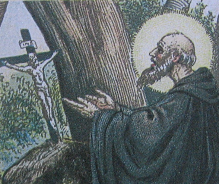 Alberto da Prezzate, monastero cluniacense, Cantù (CO)